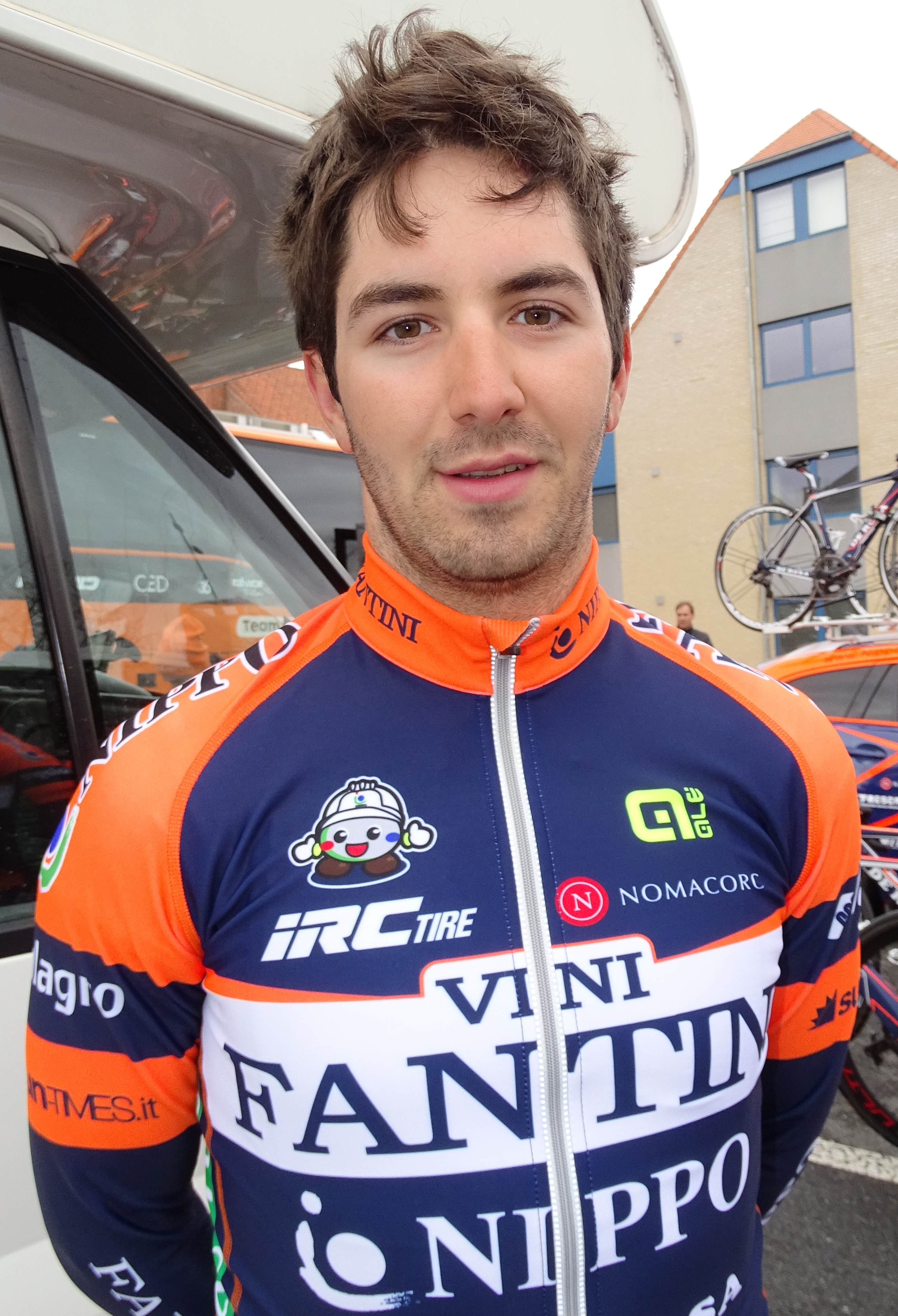 Reportage réalisé le mardi 31 mars à l'occasion de du départ de la première étape des Trois jours de La Panne 2015 à La Panne, Belgique.